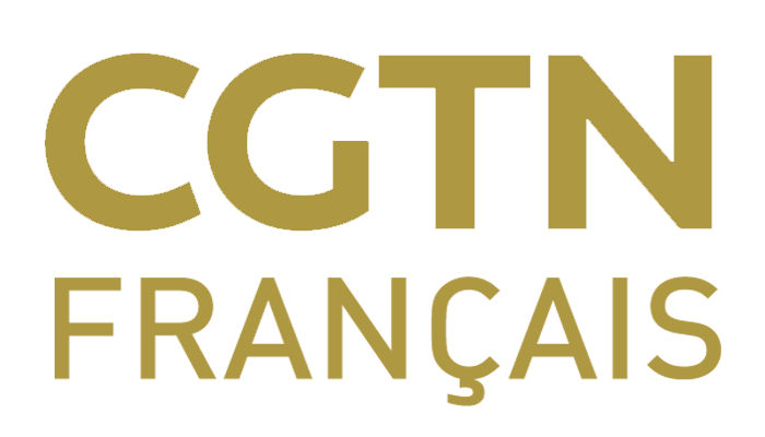 Logo de la chaîne francophone chinoise CGTN